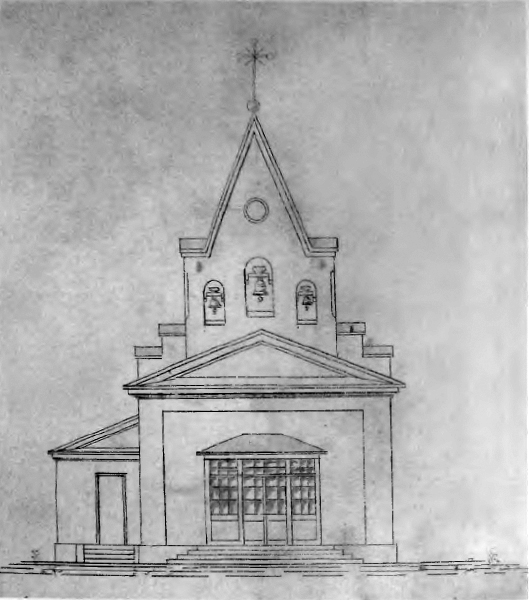 Беларуская (тарашкевіца): Дамачава (Damačava). Касьцёл, праект перабудовы з капліцы